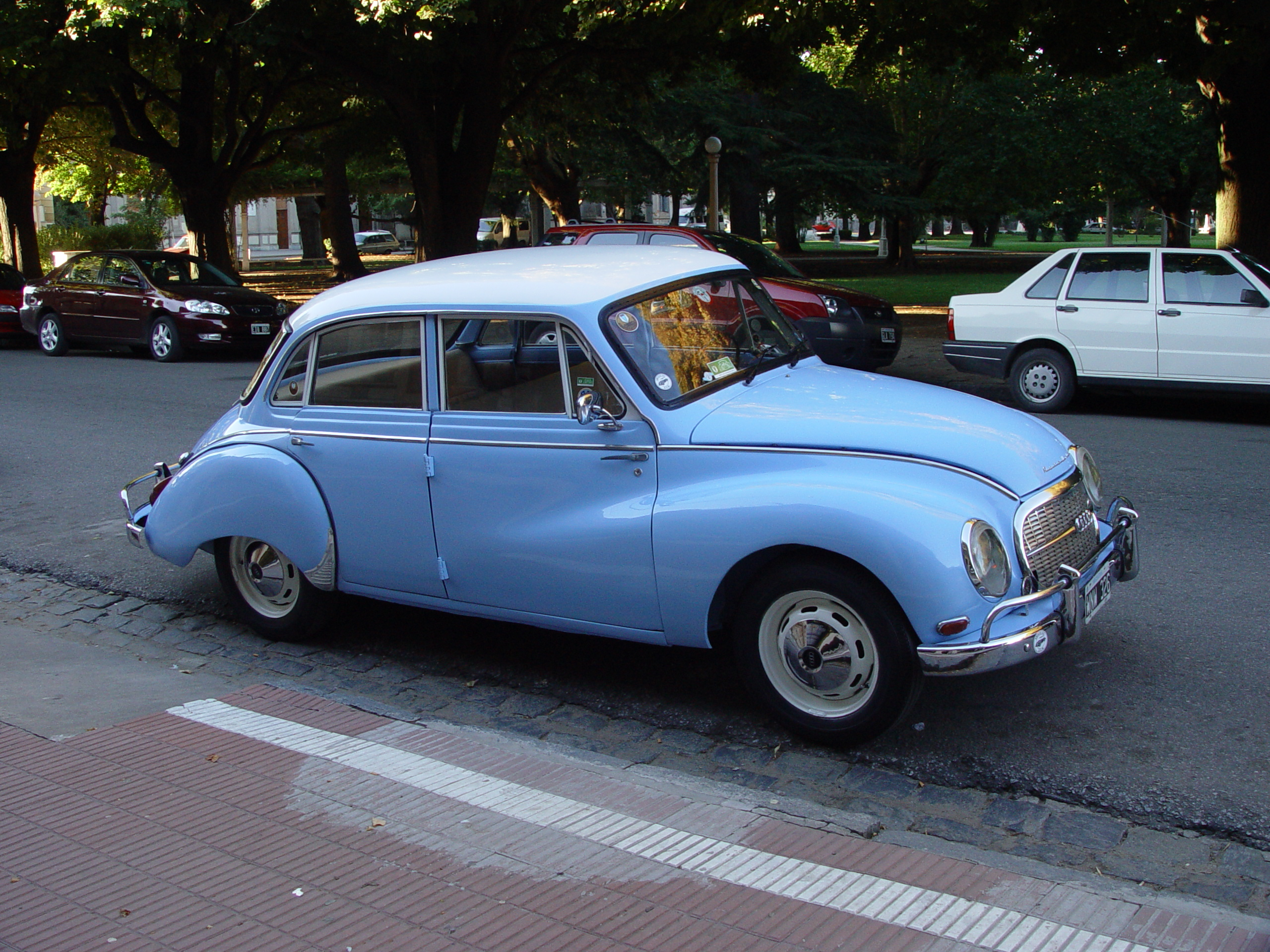 El clásico DKW Auto Unión de Marcelo Ambrustolo en Balcarce, Argentina